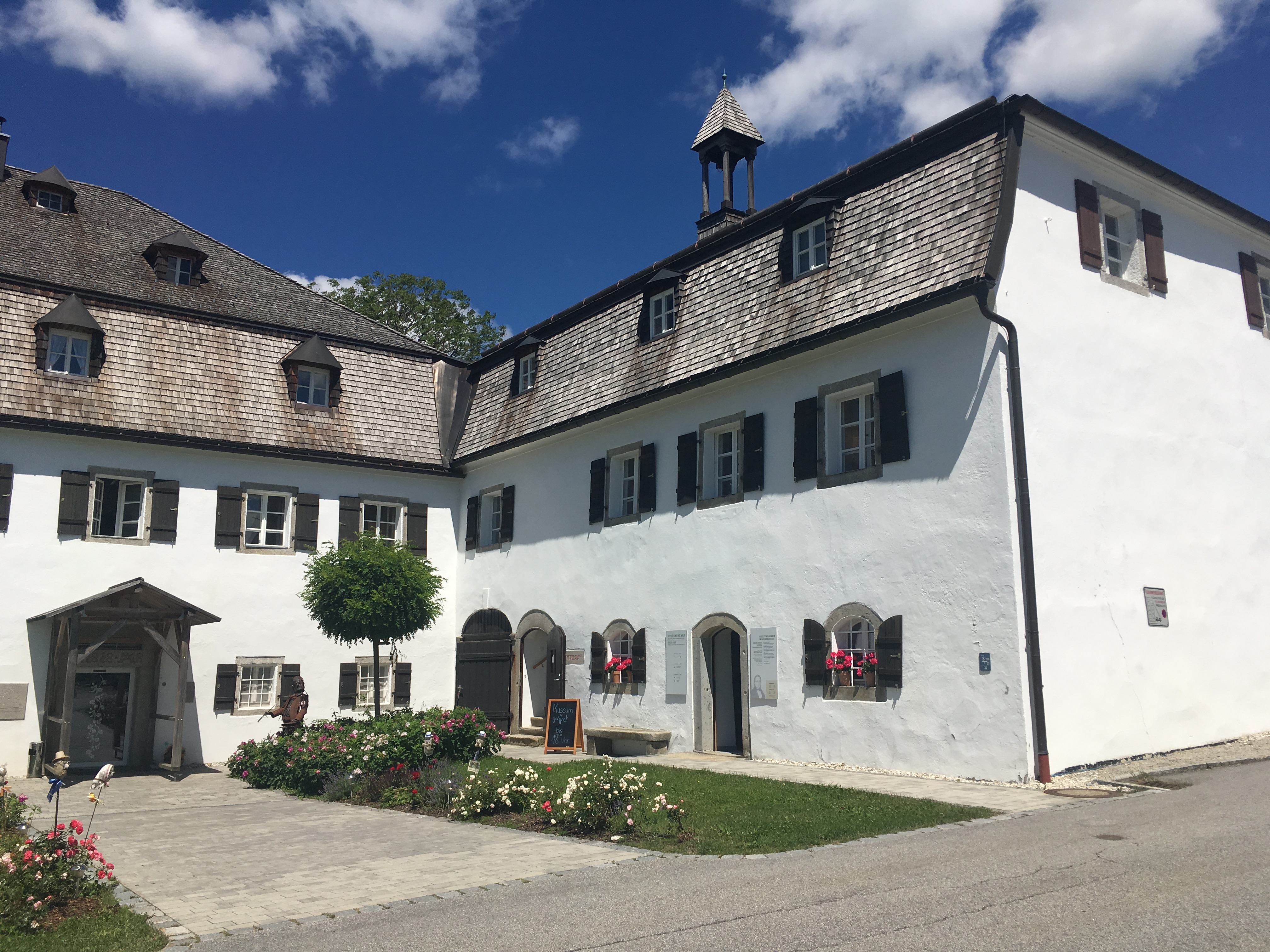 Das Ladenstöckl im Rosenbergergut in Lackenhäuser 2018